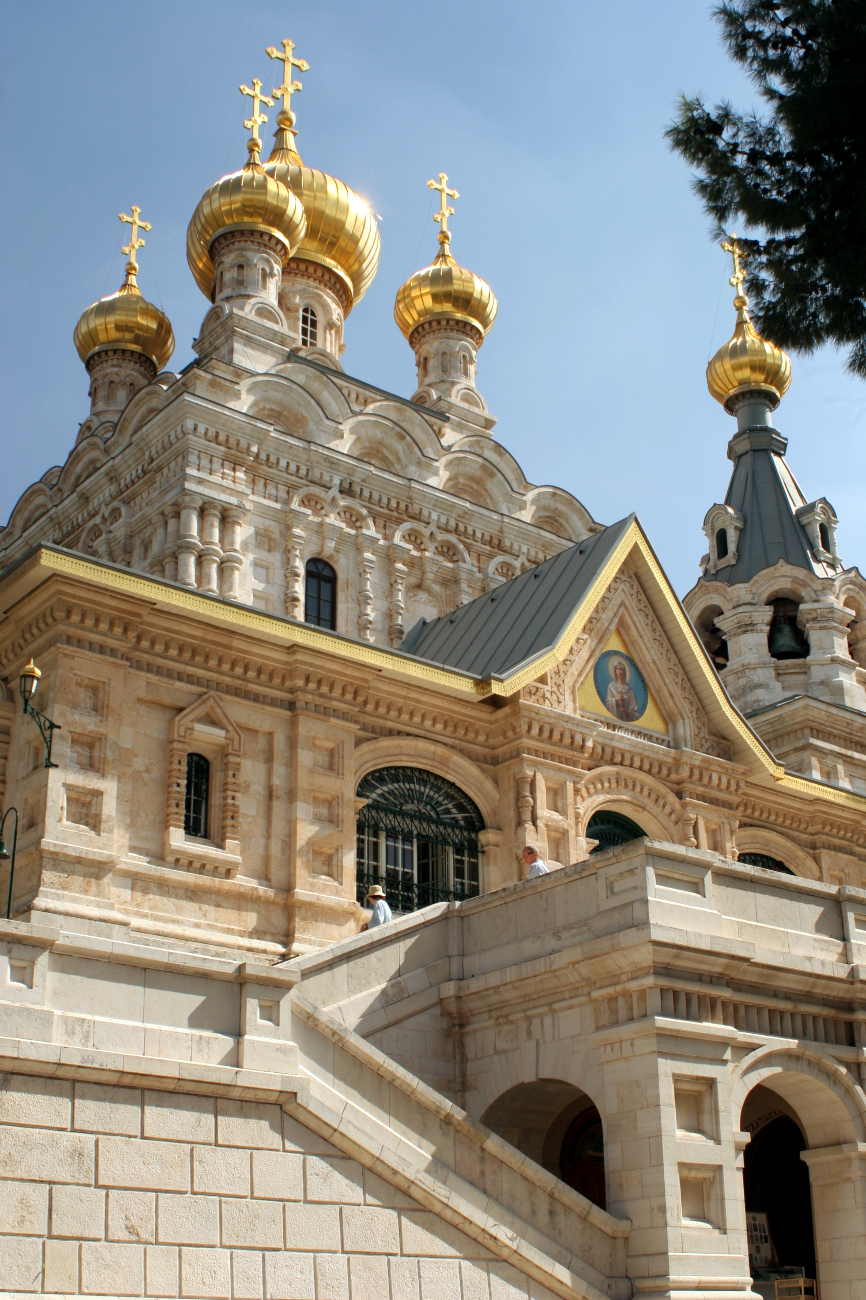 Jerusalém - Igreja Ortodoxa Russa Jerusalem